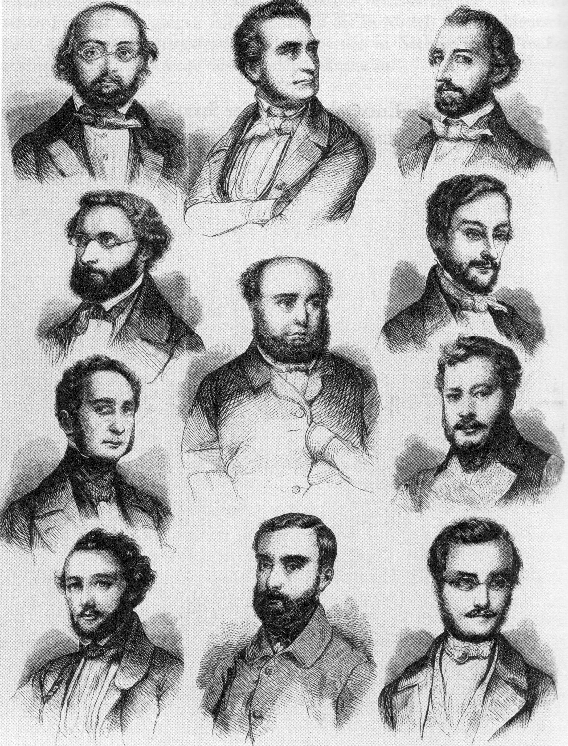 Holzstich, Präsidium der Deutschen Nationalversammlung. Von oben nach unten. Linke Spalte: Carl August Fetzer (Leonberg), Sekretär. Friedrich Sigmund Jucho (Frankfurt a. M.), Sekretär. Eduard Simson (Königsberg), Sekretär. August Rühl (Hanau), Sekretär. Mittlere Spalte: Heinrich von Gagern (Zwingenberg), Vorsitzender. Alexander von Soiron (Adelsheim/Baden), stellvertretender Vorsitzender. Victor von Andrian-Werburg (Wiener Neustadt), stellvertretender Vorsitzender. Rechte Spalte: Karl Biedermann (Zwickau), Sekretär. Friedrich Schüler (Lauterecken/Pfalz), Sekretär. Carl Möring (Wien), Sekretär. Maximilian Joseph Ruhwandl (Moosburg/Oberbayern), Sekretär.